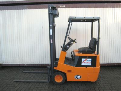 OM E3/15N, elektrischer Frontstapler, Baujahr: 1997, zweifaches Freisicht-Hubgerüst, Superelastikreifen, Hubhöhe: 4000mm, Eigengewicht: 3160kg, Gabellänge: 1200mm, Tragfähigkeit: 1500kg, Bauhöhe: 2540mm